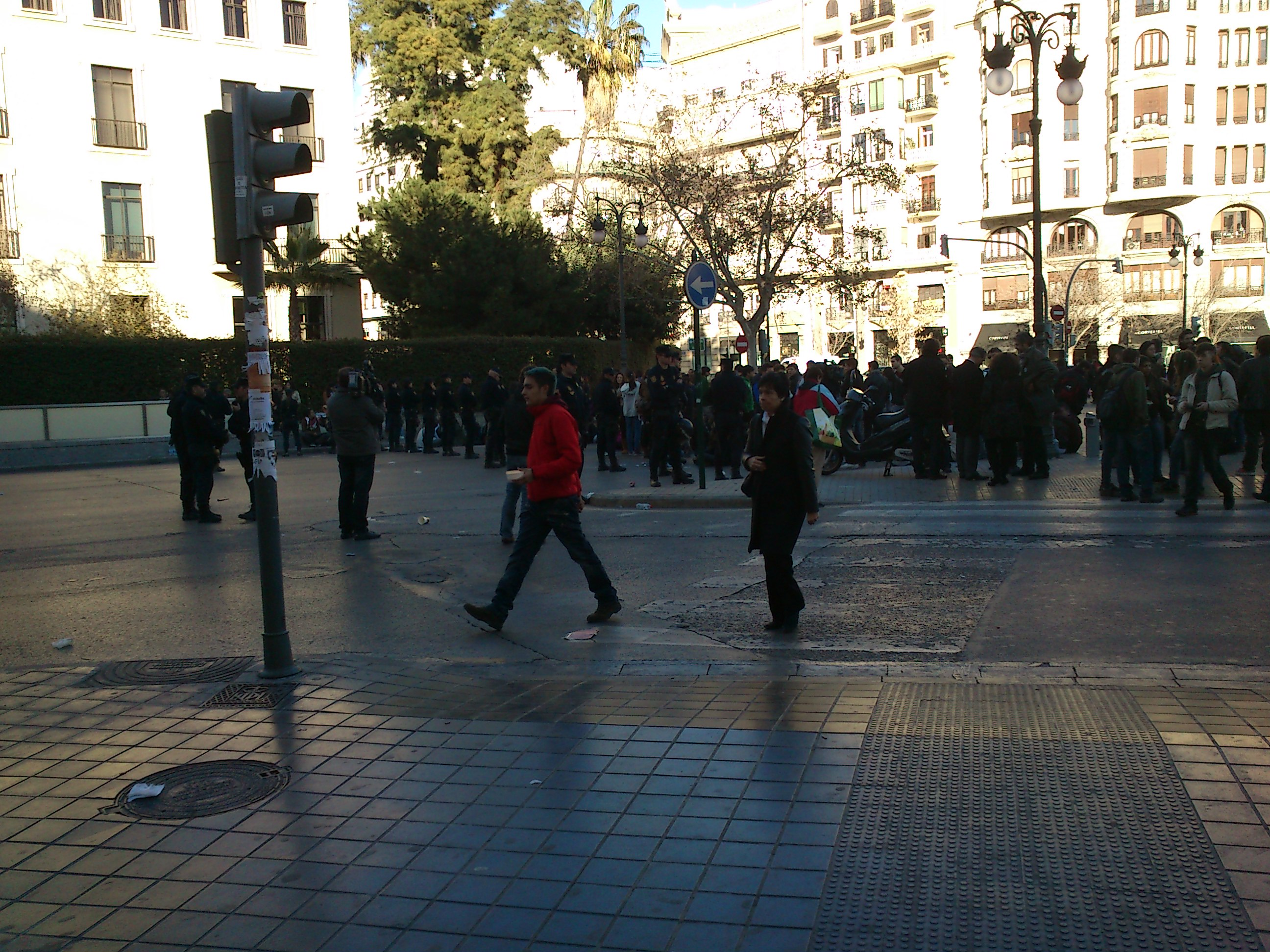 Antidisturbios de la Policía Nacional de España frente al ES Lluis Vives de Valencia, España, durante una protesta pacífica de estudiantes.